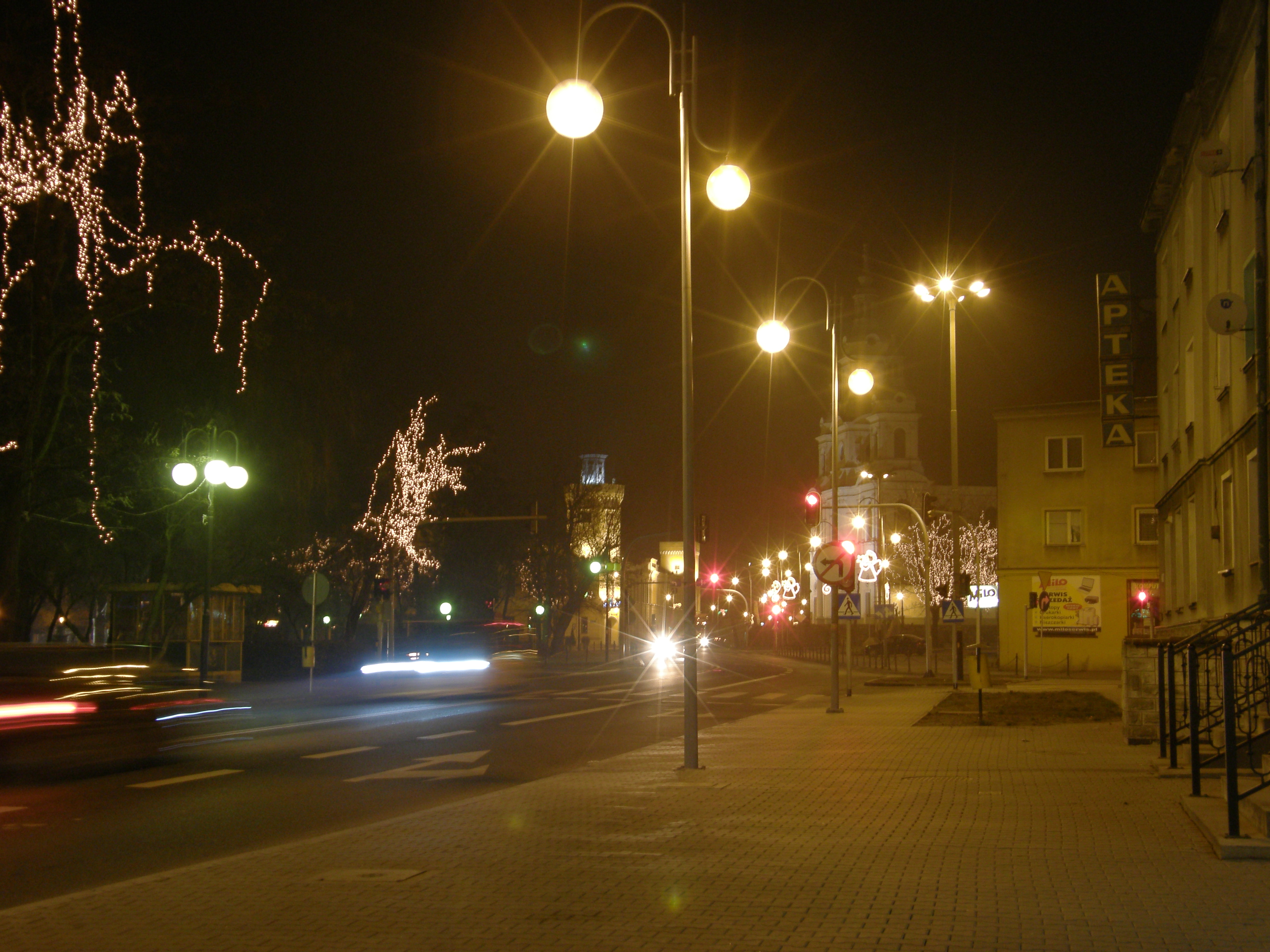 Centrum Radomska nocą